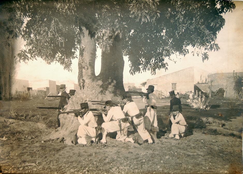 Fotografía de fuerzas del ejército gubernamentales de Uruguay realizando prácticas de tiro, en el marco de la revolución de 1904.